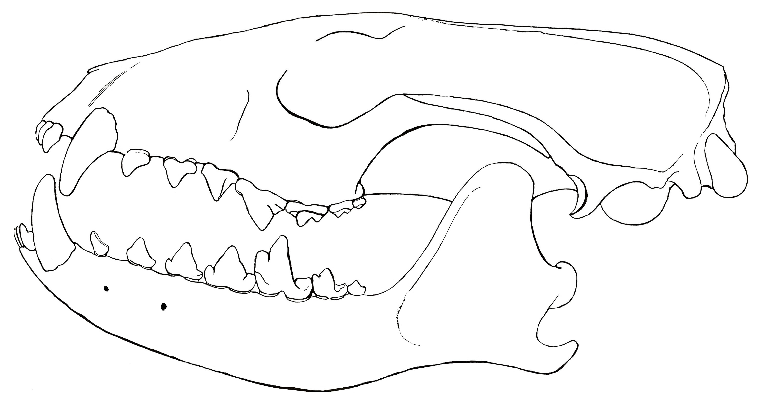 Vulpavus hargeri skull